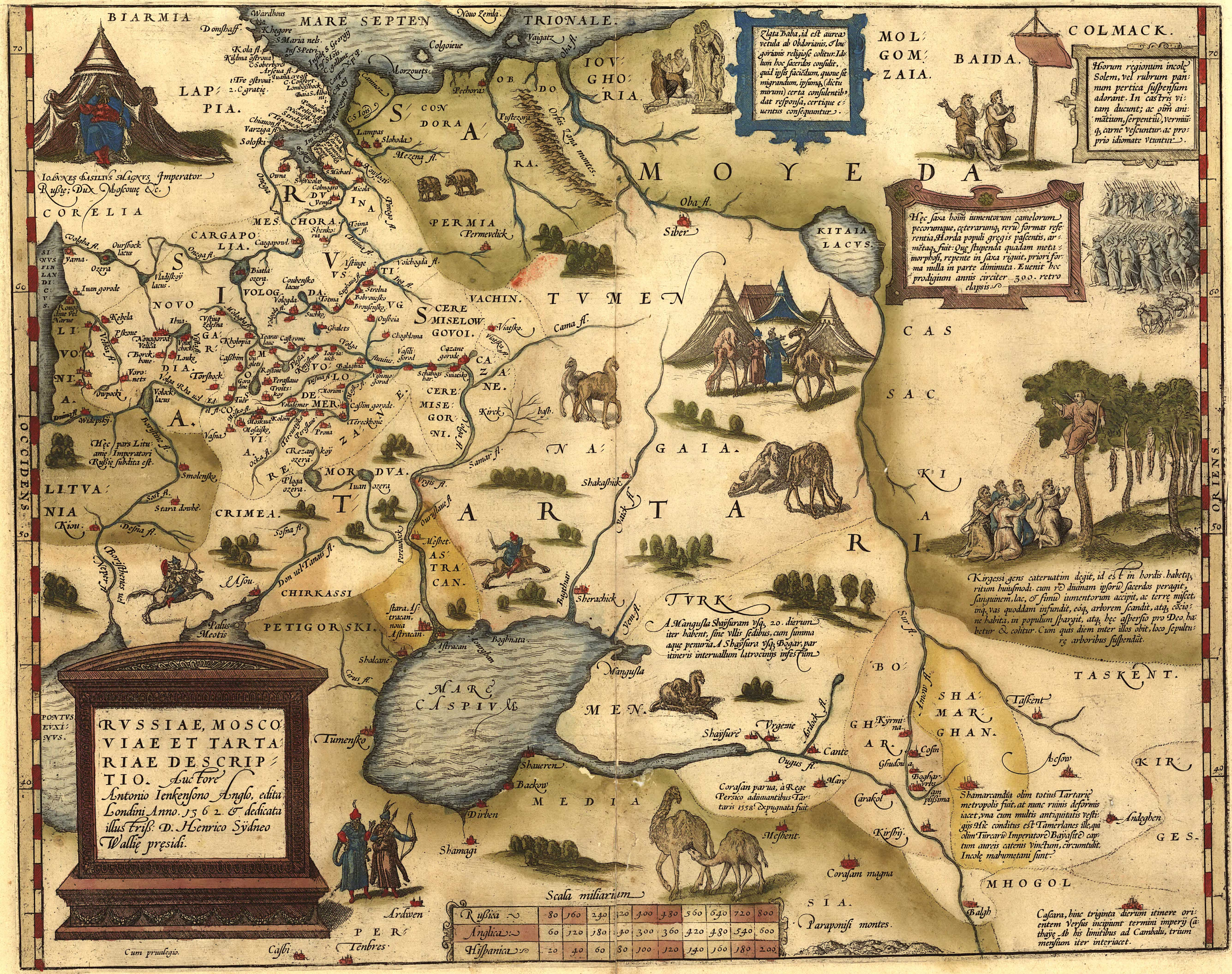 Карта России создана на основе карты 1562 года английского купца и дипломата Энтони Дженкинсона